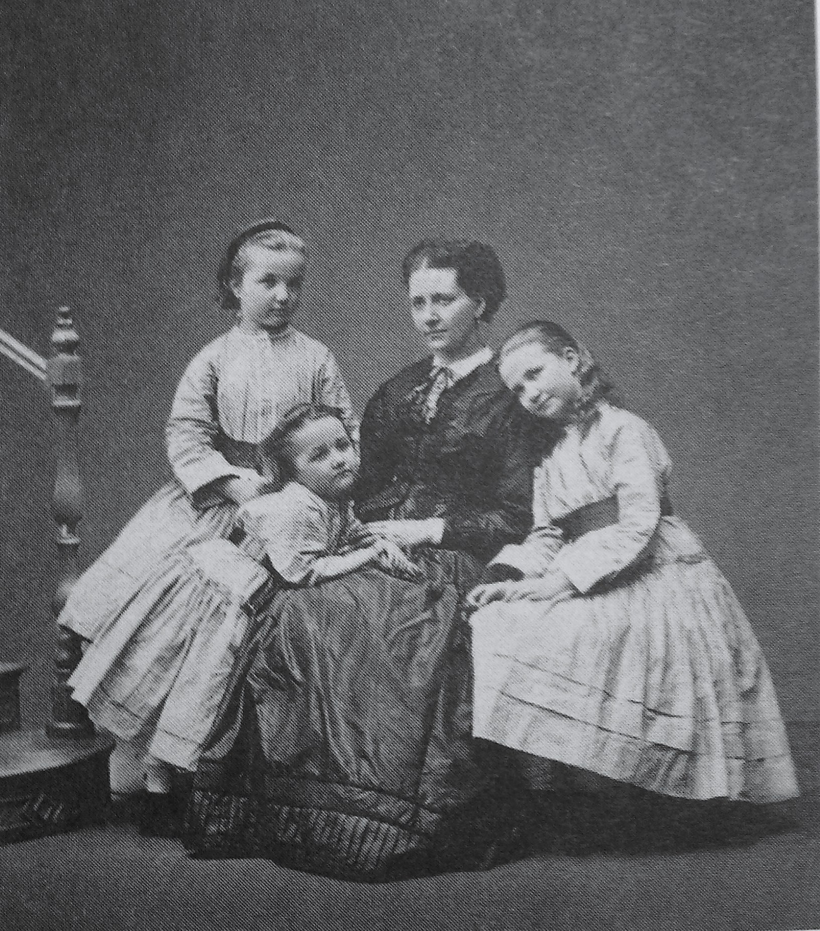 Мария Павловна Щербатова, ур. Муханова (1836—1892) с дочерьми Софьей, Марией и Ольгой.